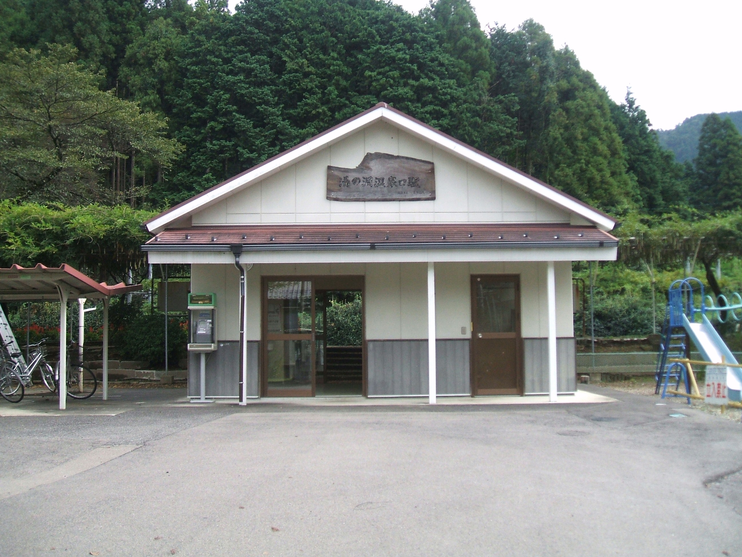 湯の洞温泉口駅舎。